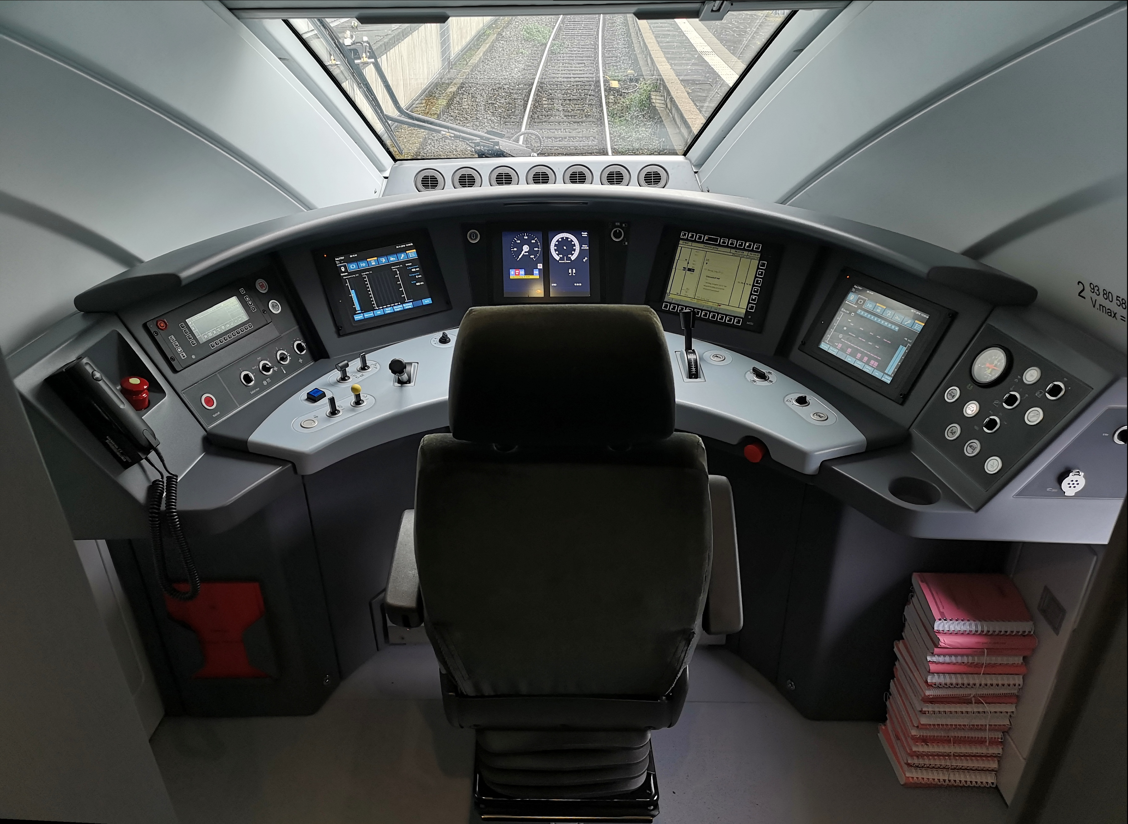 ICE 4 Führerstand beleuchtet